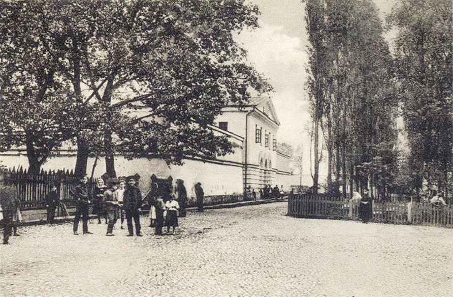 Беларуская (тарашкевіца): Менск (Miensk), Пішчалаўскі замак (Piščałaŭski zamak)